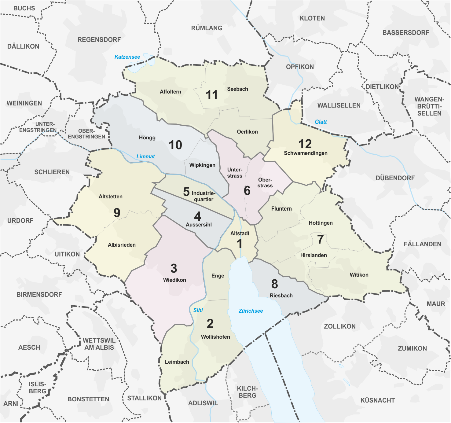 Städtische Quartier von Zürich